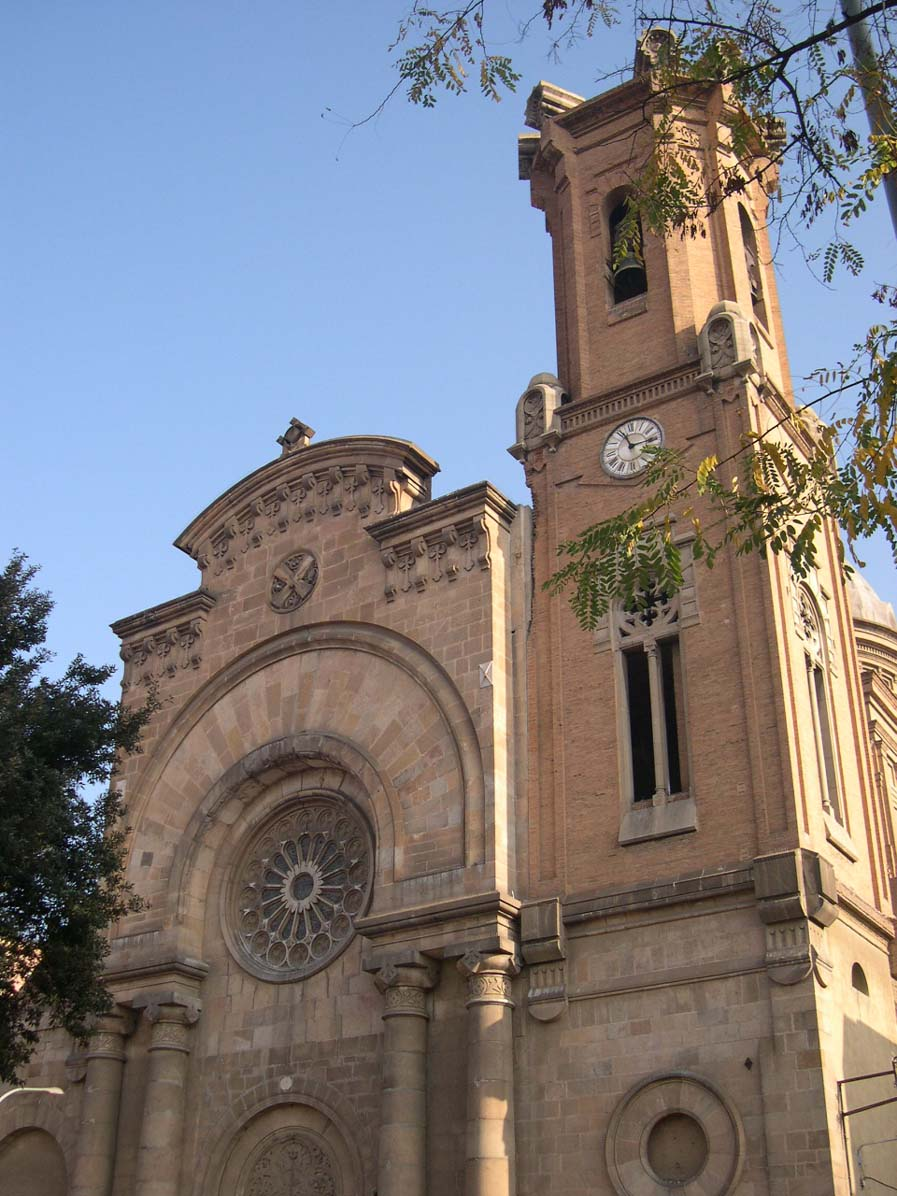 Iglesia San Andrés de Palomar en Barcelona